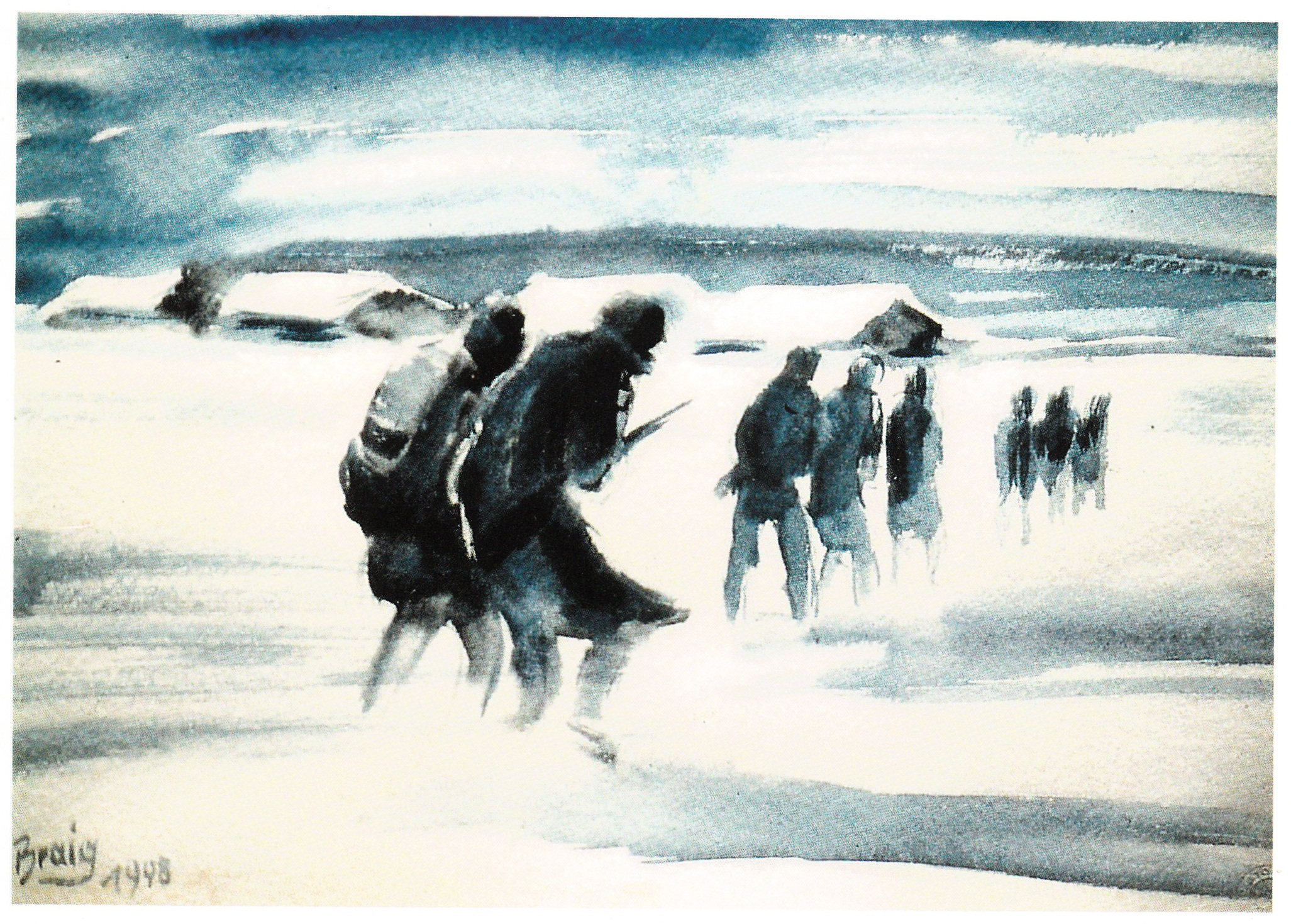 Spähtrupp (Öl auf Leinwand)